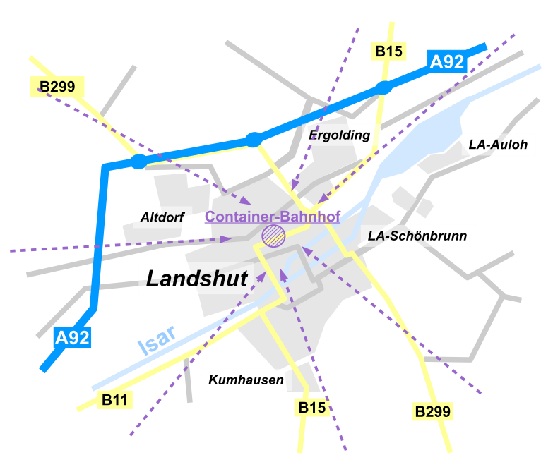 Verkehrliche Anbindung Containerbahnhof Landshut